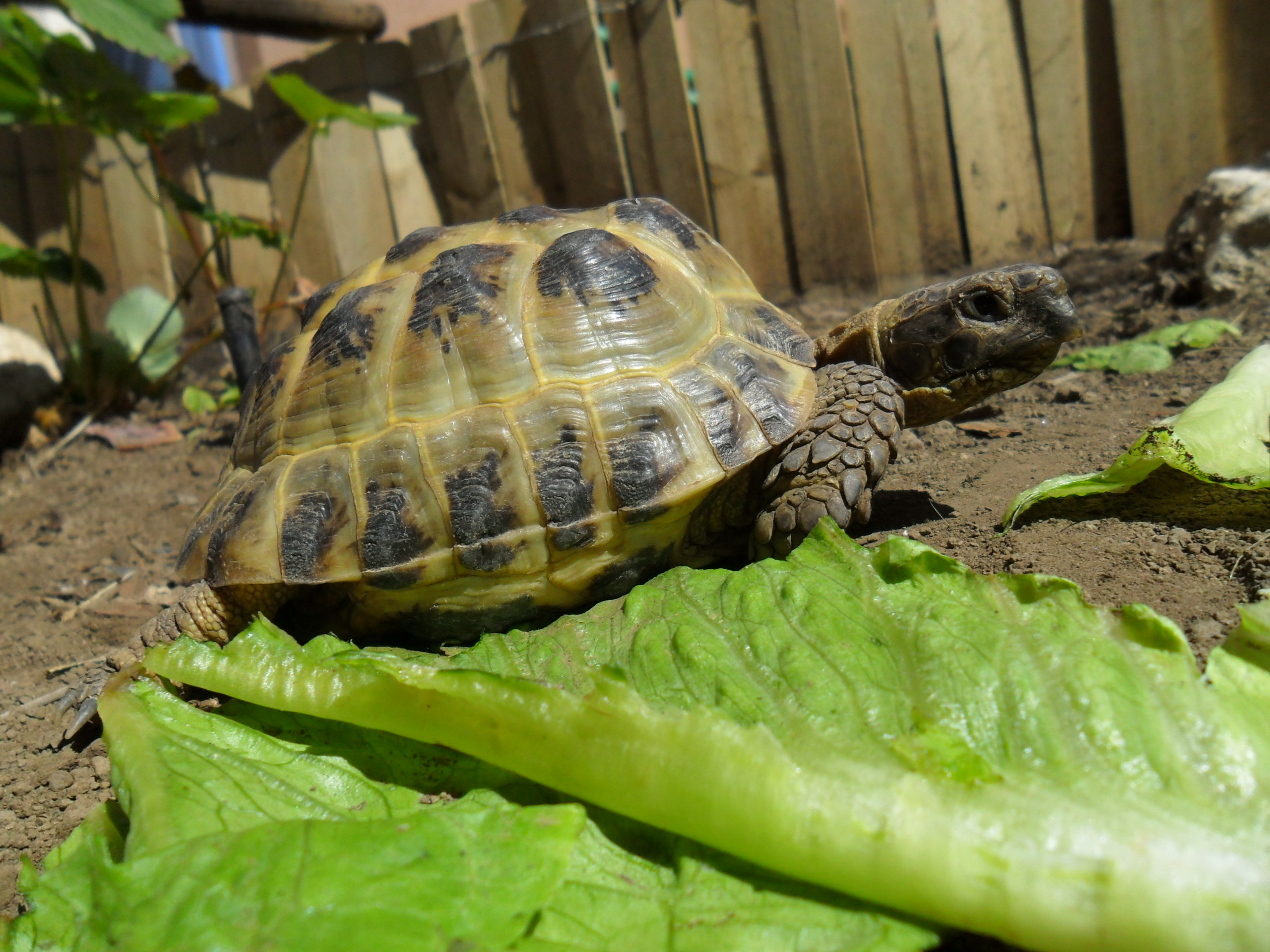 Testudo Horsfieldii Maschio Adulto